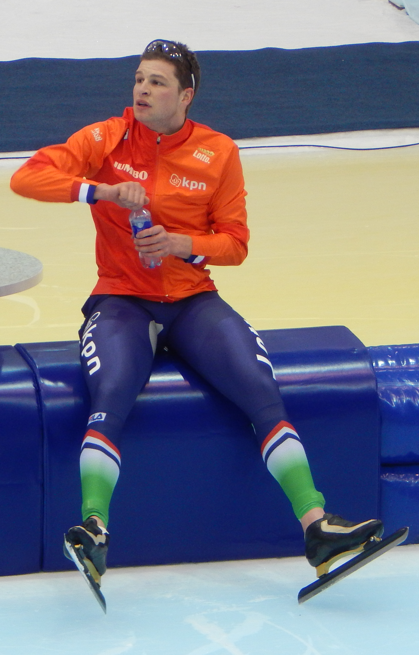 Чемпионат мира по конькобежному спорту 2016 в Коломне. Свен Крамер после победы на дистанции 10000 метров у мужчин